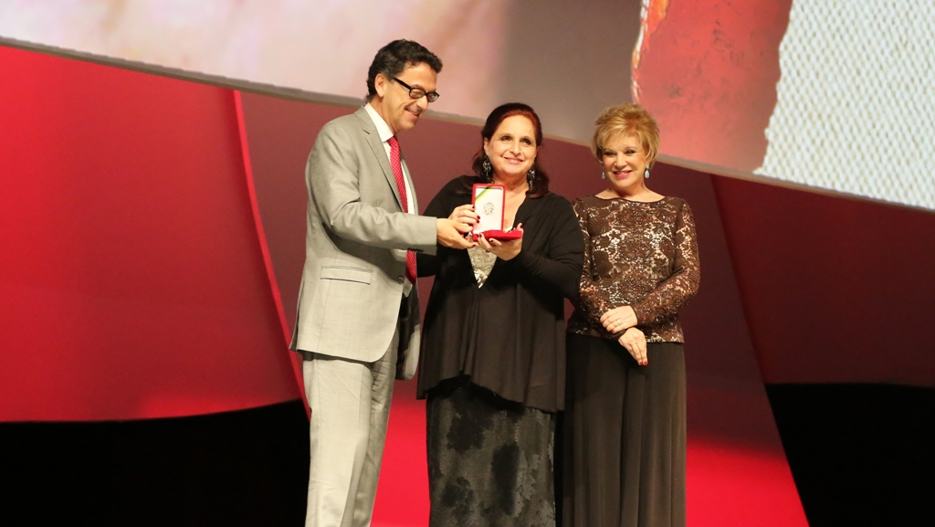 São Paulo (SP) | Ministério da Cultura celebra a Ordem do Mérito Cultural 2013. Na foto: Mira Haar recebe medalha. 05.11.2013 Foto: Elisabete Alves